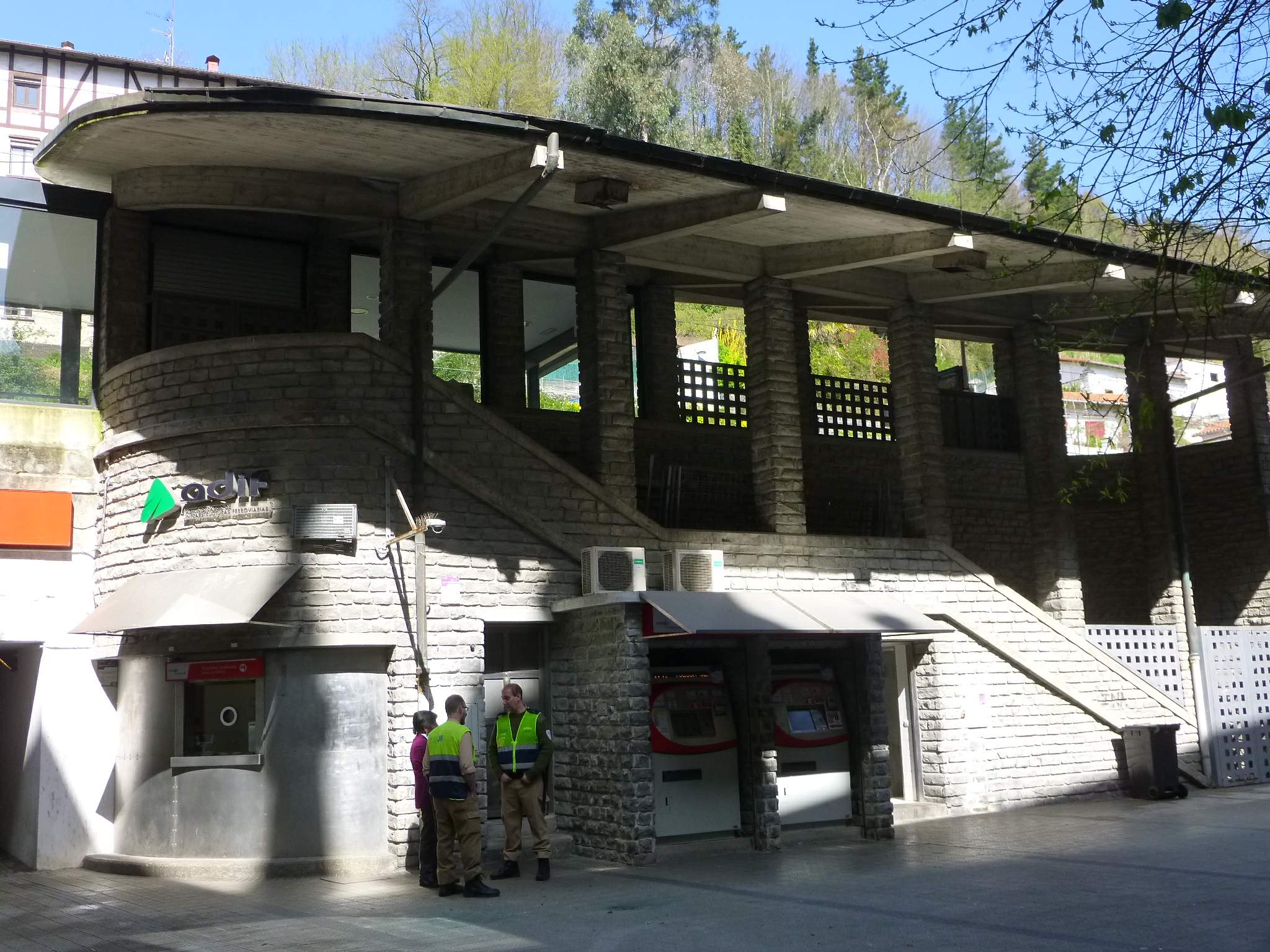 Apeadero de Tolosa Centro